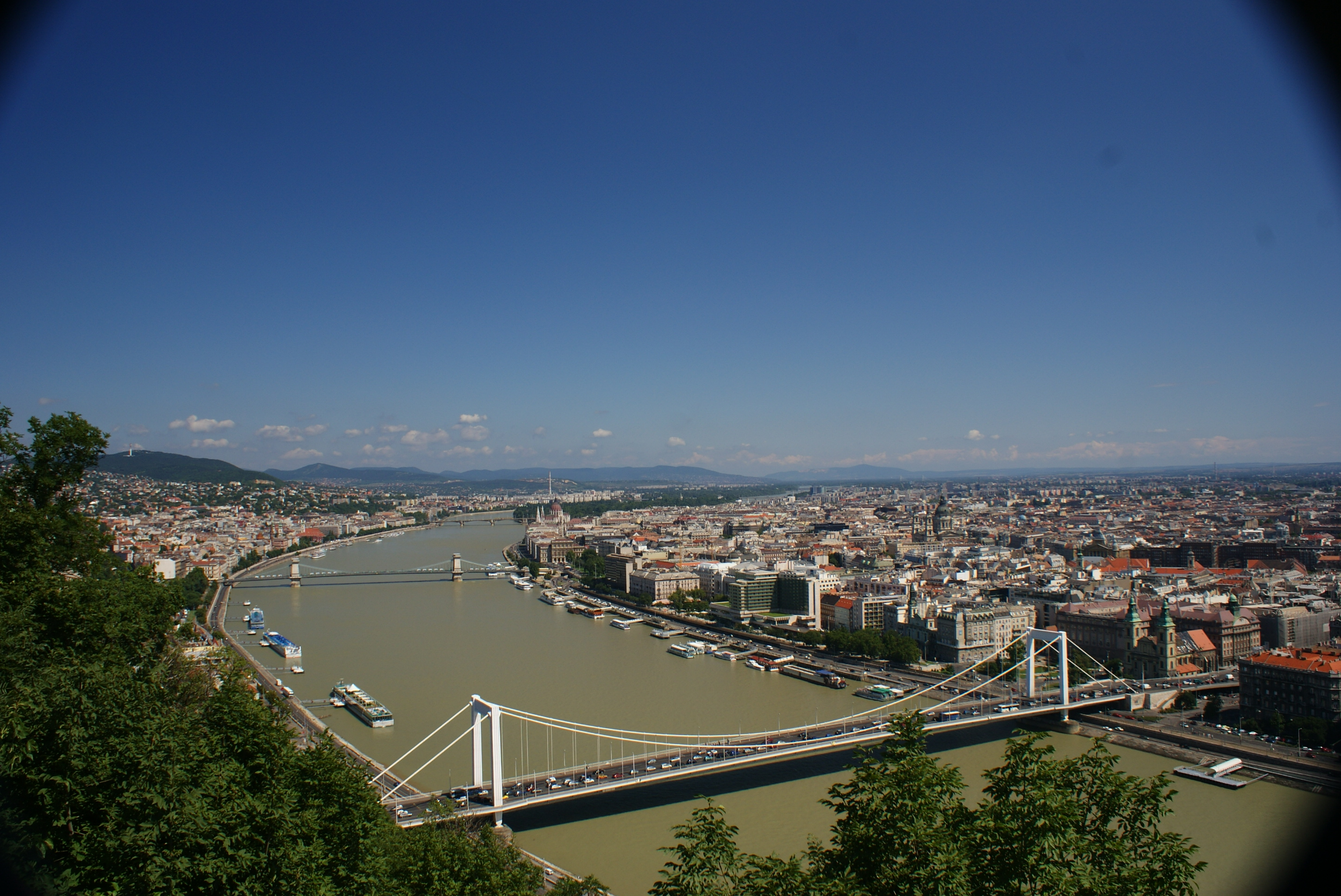 Panorama Budapesztu.